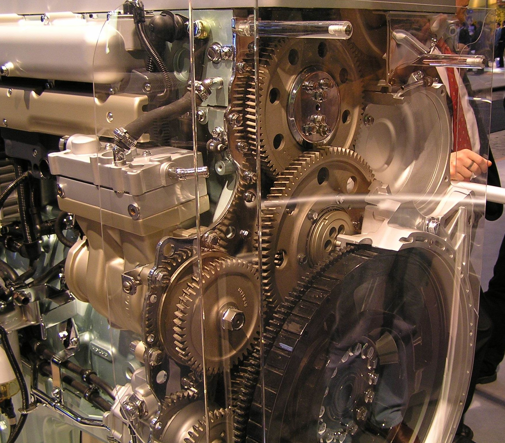 Volvo truck engine